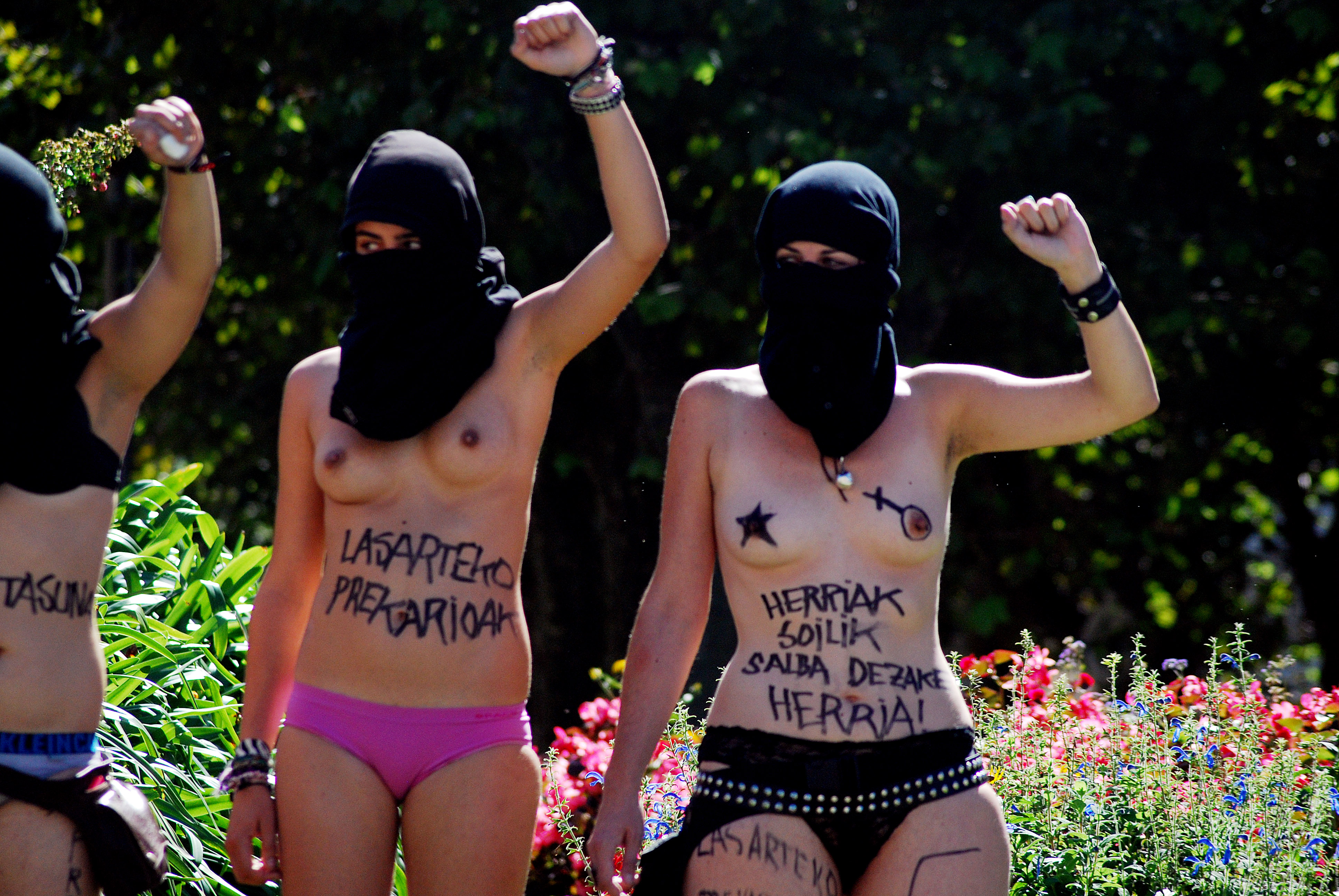 1:Emakumeak protestan 2012ko irailaren 26ko Donostiako manifestazioan.